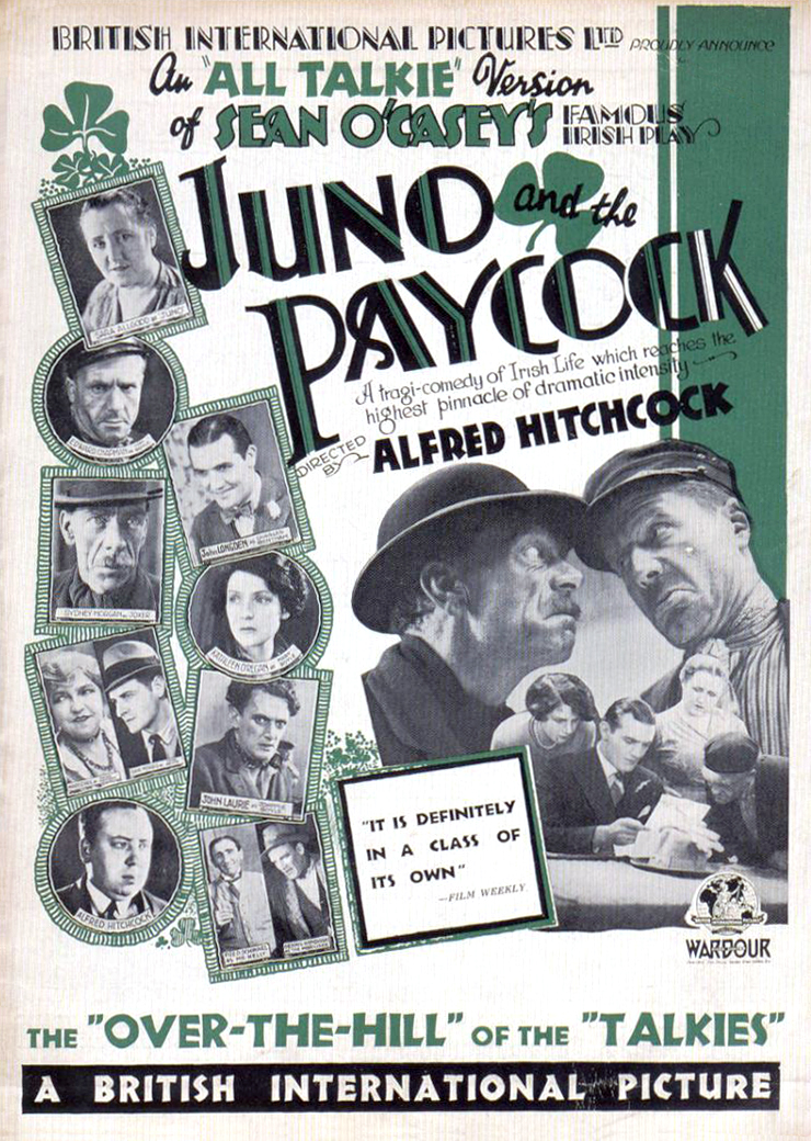 Постер к фильму «Юнона и павлин» (англ. Juno and the Paycock, альтернативное название англ. The Shame of Mary Boyle) 1930 г.